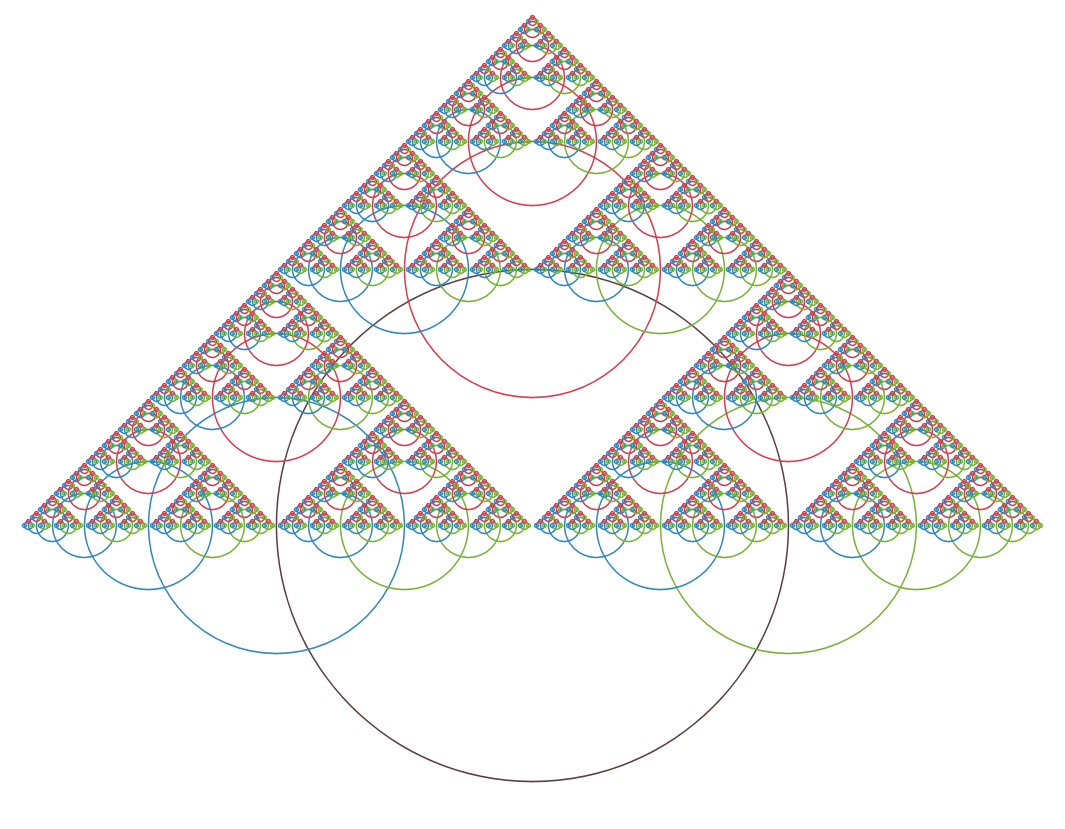 Triangle de Sierpinski obtingut dibuixant cercles